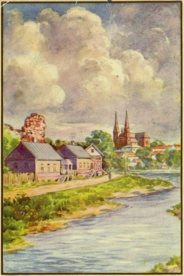 Vaade jõelt Räisaku linnusevaremetele ja katoliku katedraalile. Maal XX sajandi 20ndatest aastatest.